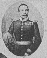 Jakob von Ermarth (1790-1865), geadelter bayerischer Generalleutnant